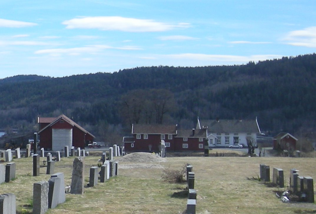 Gjerstad prestegård sett fra kirken